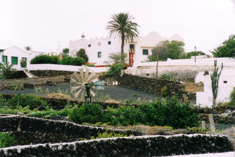 Yaiza auf der Insel Lanzarote. Bearbeitung: gescannt 300dpi, Nachbearbeitung: Ränder geschnitten